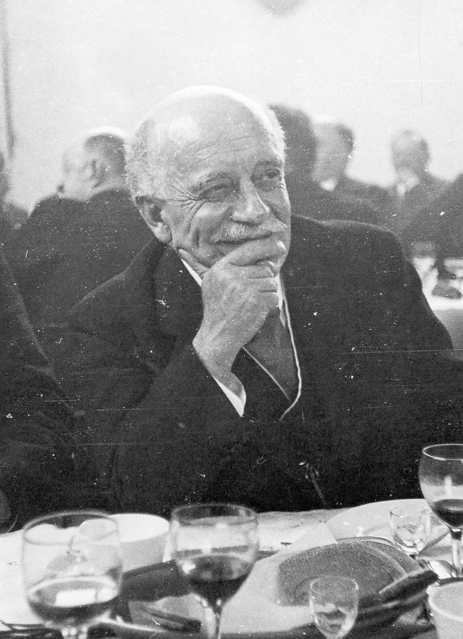 Jean Sendrail (1872-1935), vétérinaire, professeur de pathologie chirurgicale, directeur de l'École nationale vétérinaire de Toulouse de 1929 à 1935, maire de Clermont-le-Fort (Haute-Garonne), ici photographié dans un banquet de l’École Normale. Jean Sendrail était aussi président de la fédération départementale des oeuvres laïques de la Ligue française de l'enseignement.